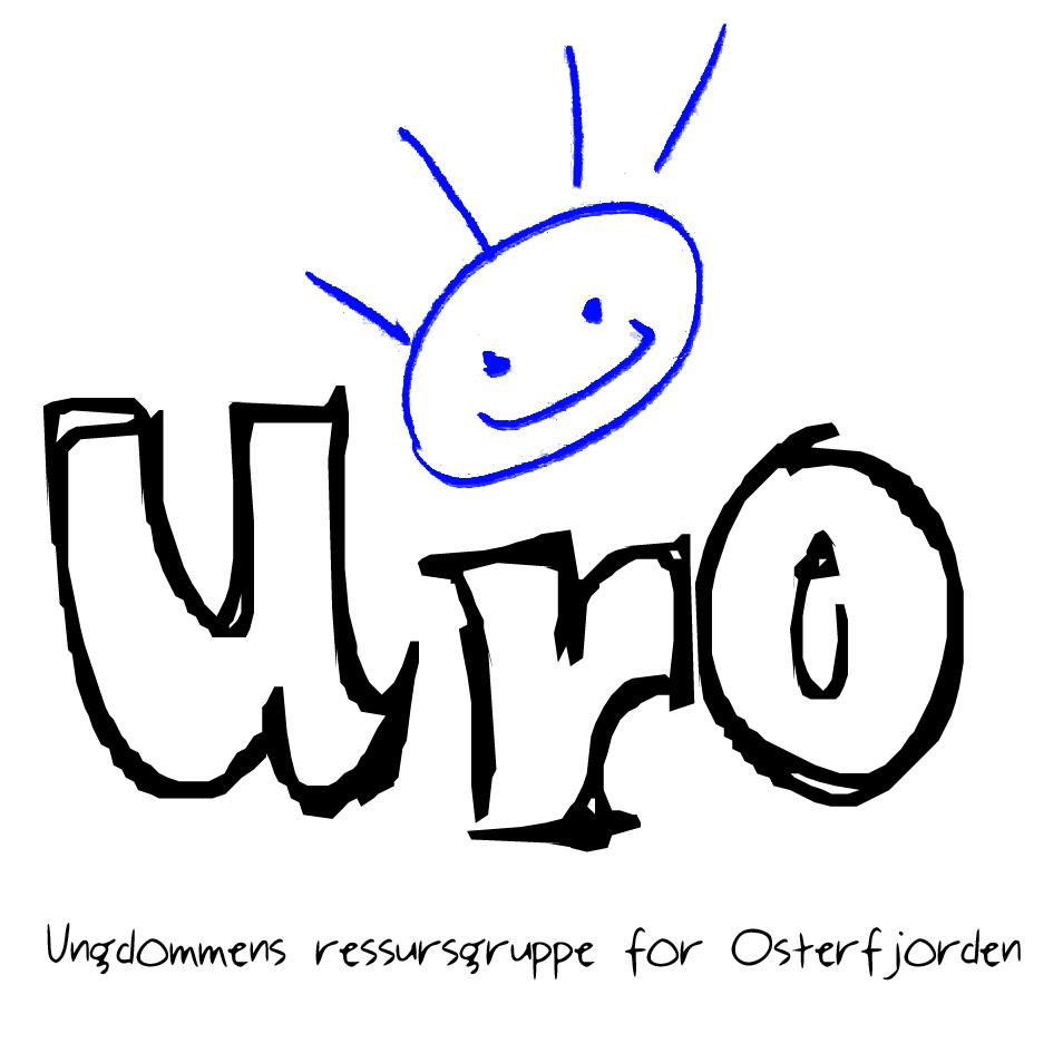 UrO sin logo